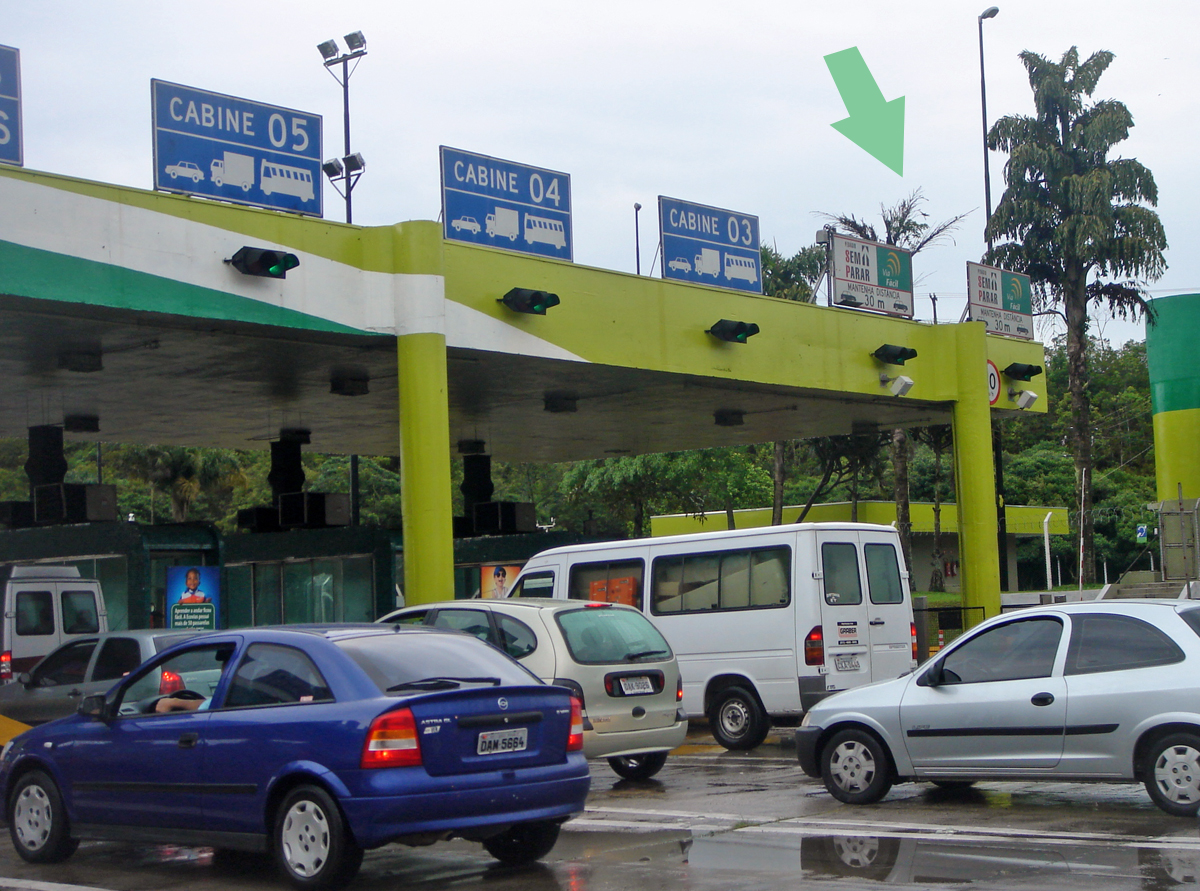 Estacion de cobro de peaje en la Rodovia dos Imigrantes Sao Paulo-Santos, Brasil